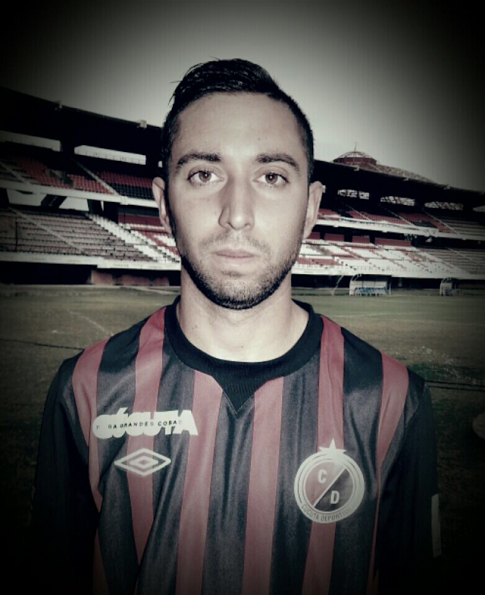 Franco Del Giglio